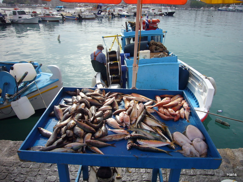 Kos Harbour